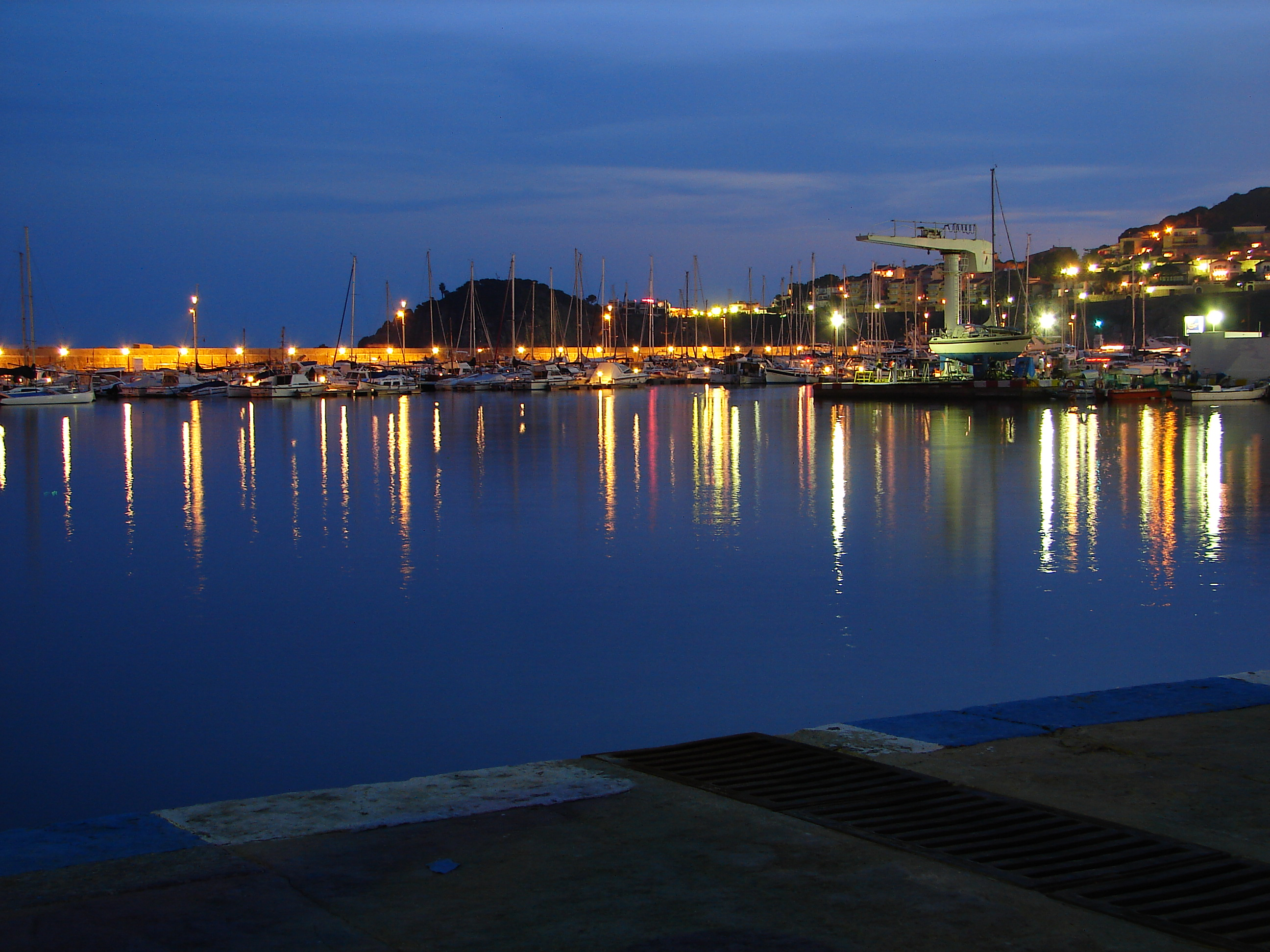 Port de Sant Feliu de Guíxols, Setembre 2006.